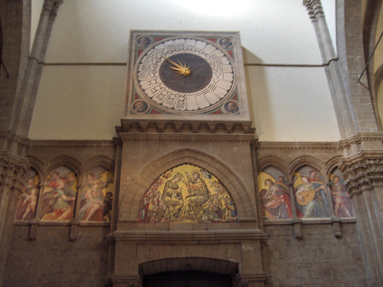 L'orologio dipinto da Paolo Uccello all'interno di Santa Maria del Fiore a Firenze.